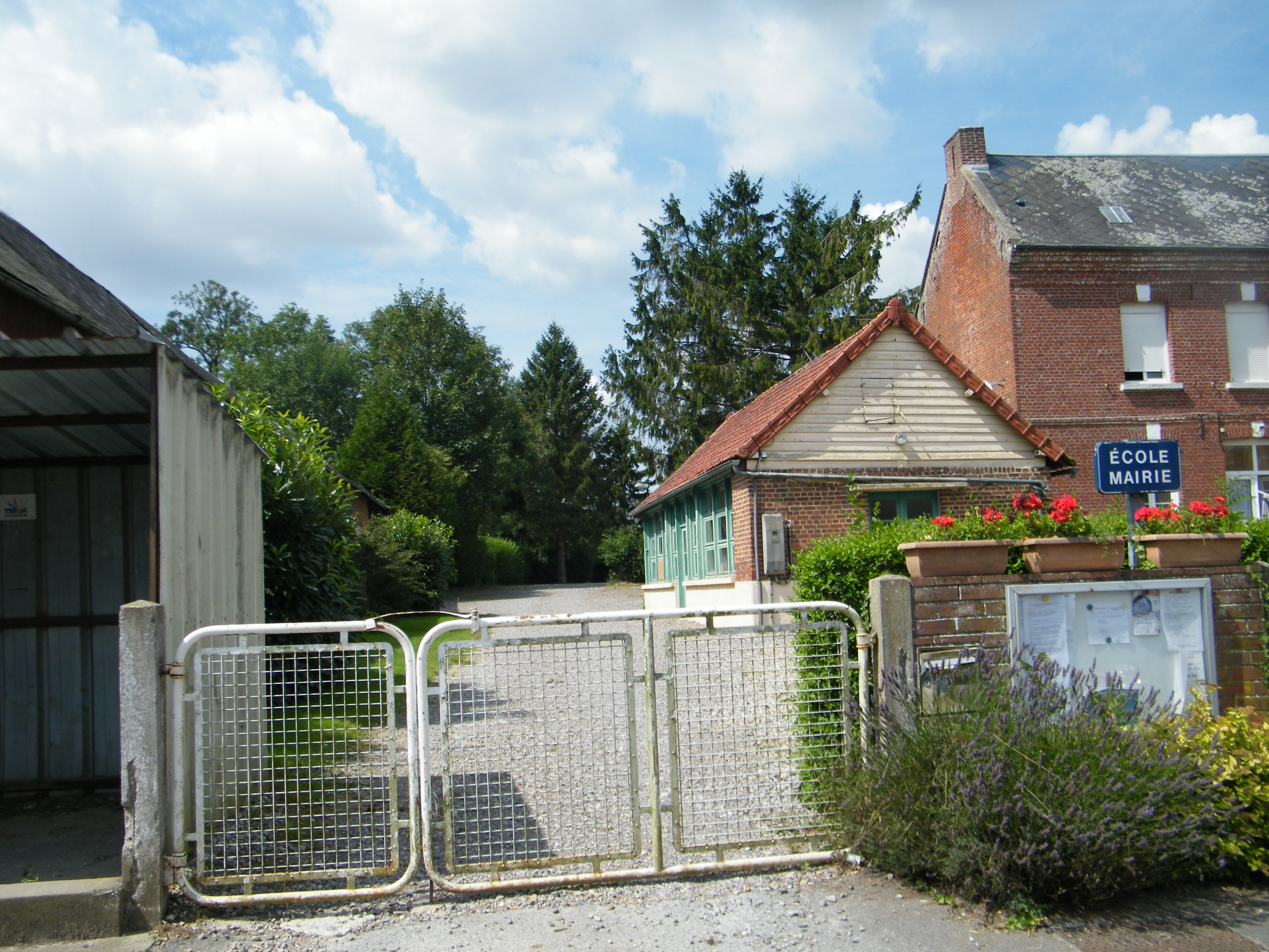 Mairie-école.